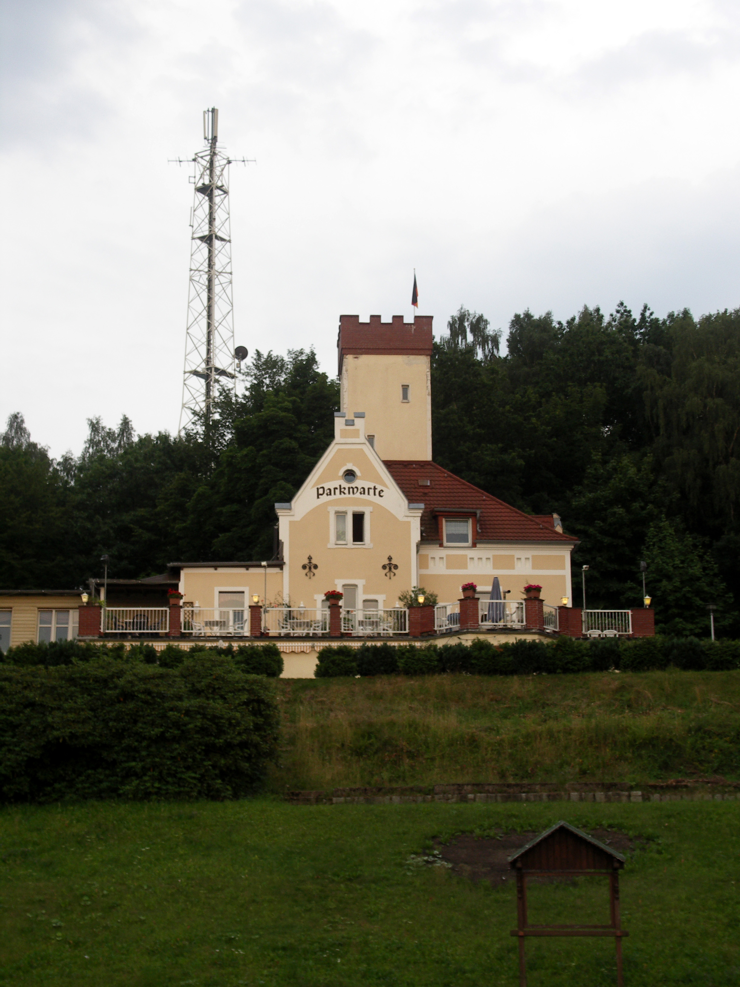 Aue, Parkwarte